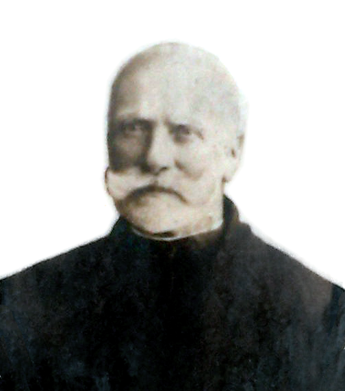 Protopopul greco-catolic Valeriu Florianu(26 iunie 1864 -- 17 iunie 1946), Racoviţa Sibiu.